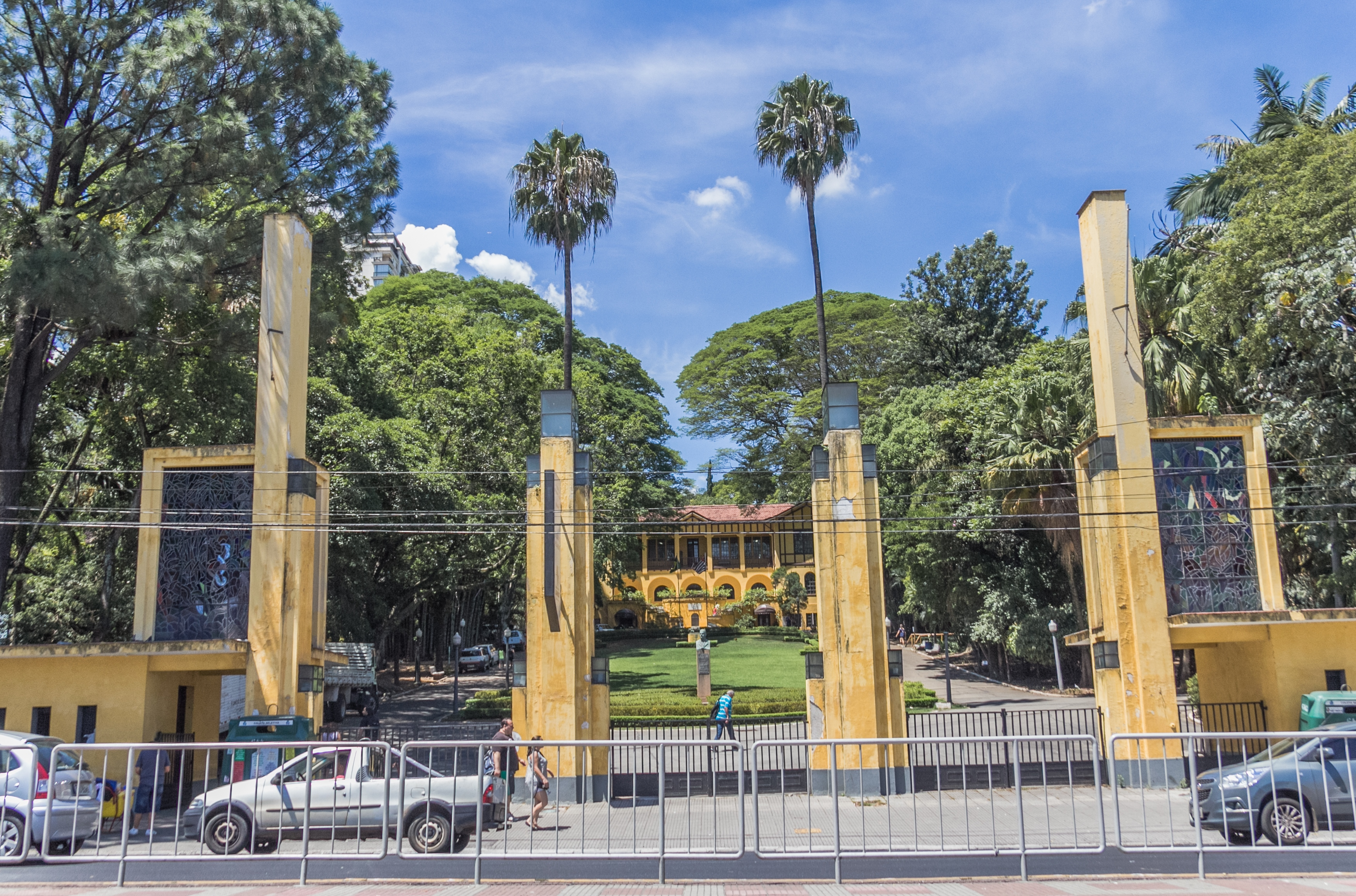 O belo parque de exposiçoes da Agua Branca em Sao Paulo,2014